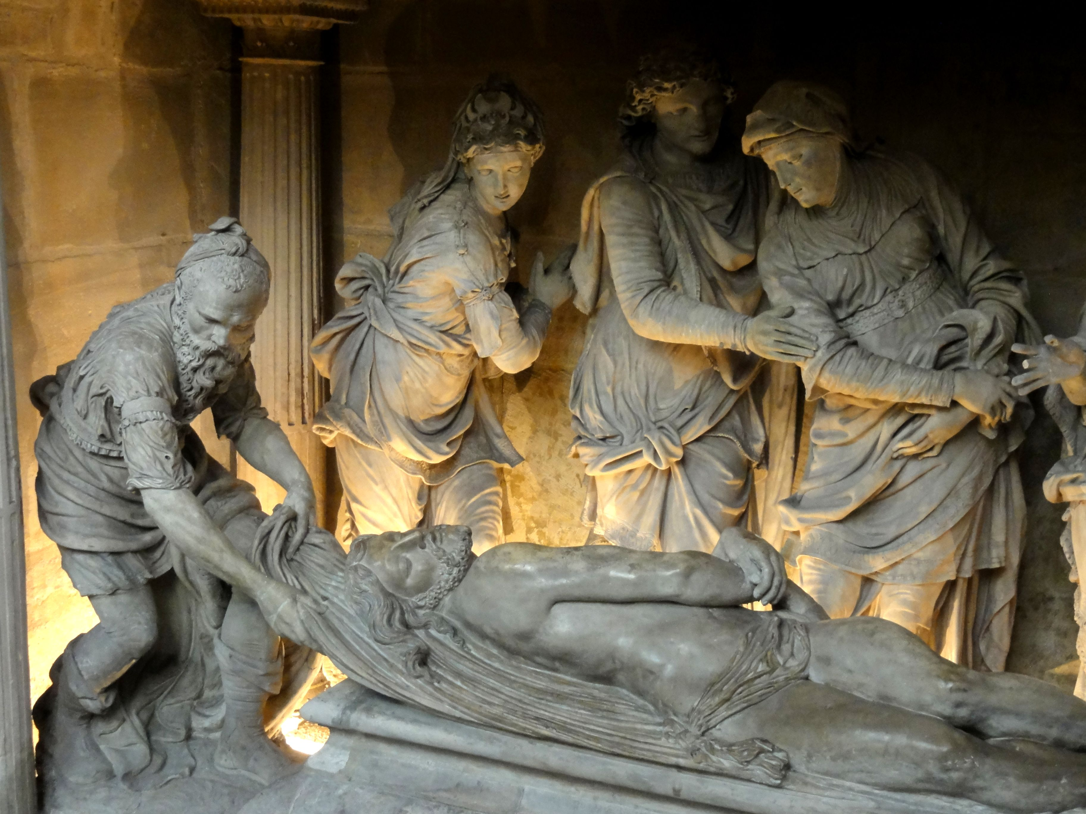 Le Christ et les quatre personnages de gauche (Joseph d'Arimathie, Madeleine, Jean consolant la Vierge Marie).